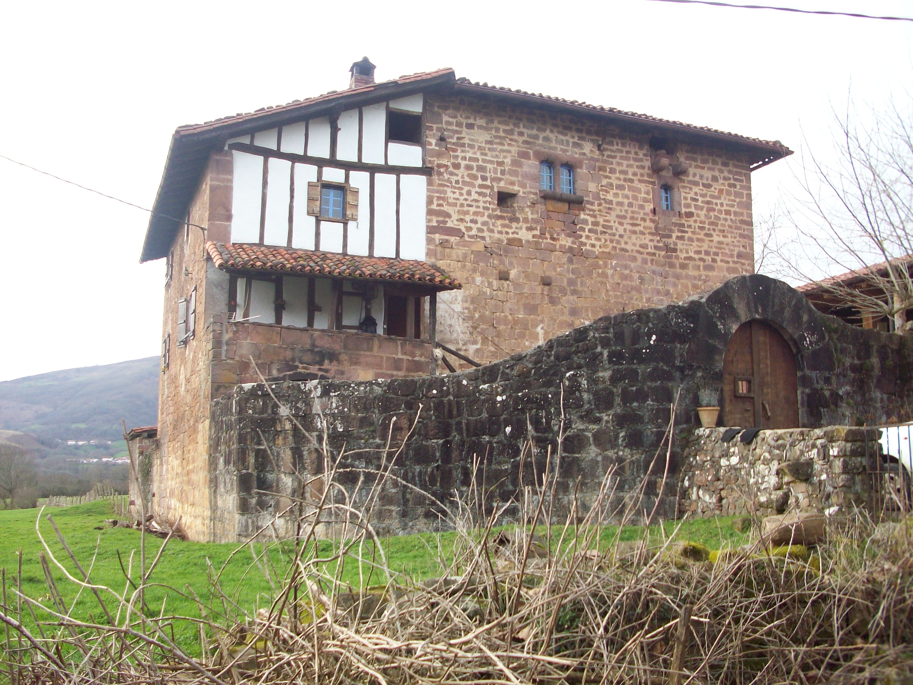 Baztango Arizkun herriko Ursua jauregia. Nafarroa, Euskal Herria.